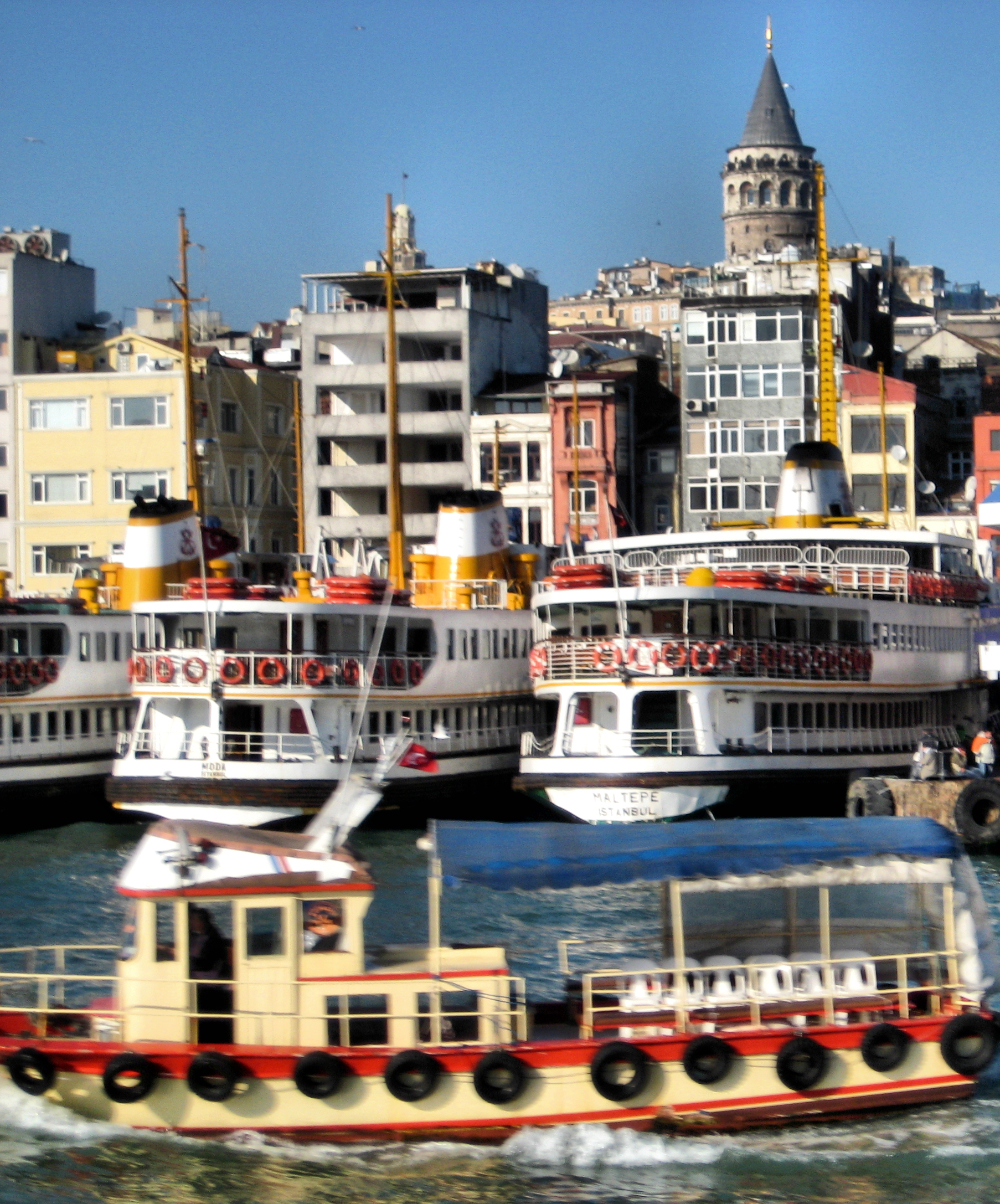 Galata